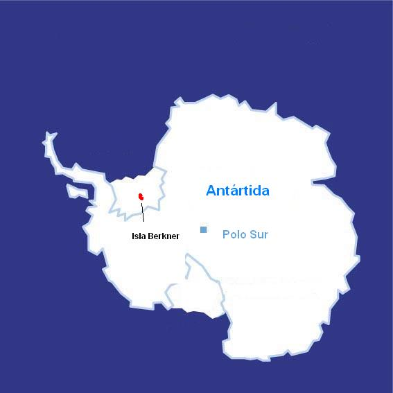 Isla Berkner